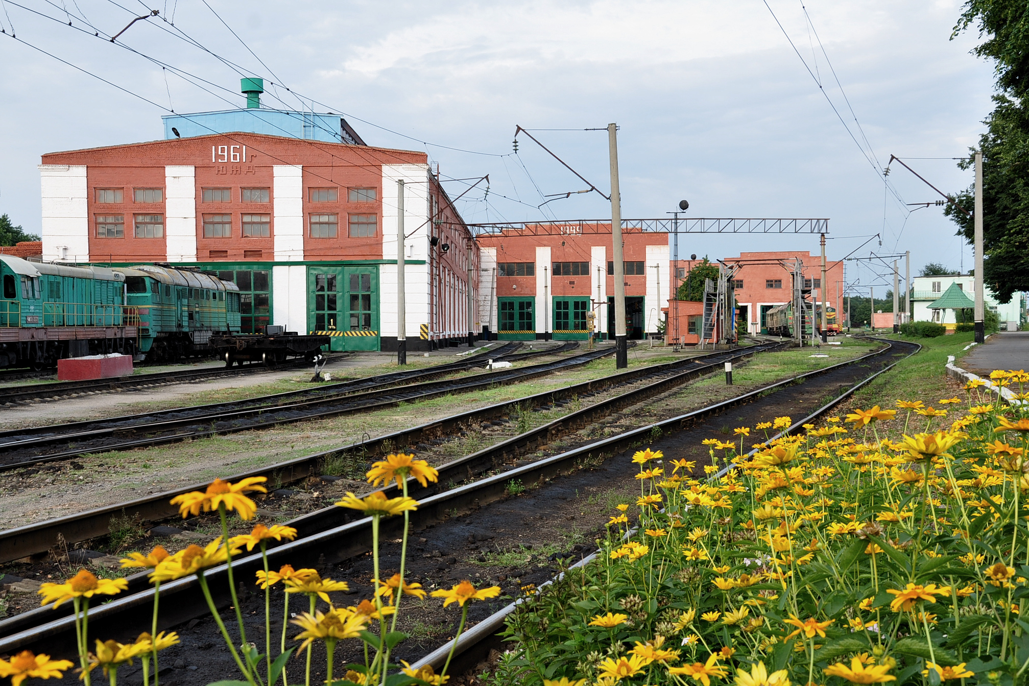 Локомотивное депо ТЧ-12, Гребёнка